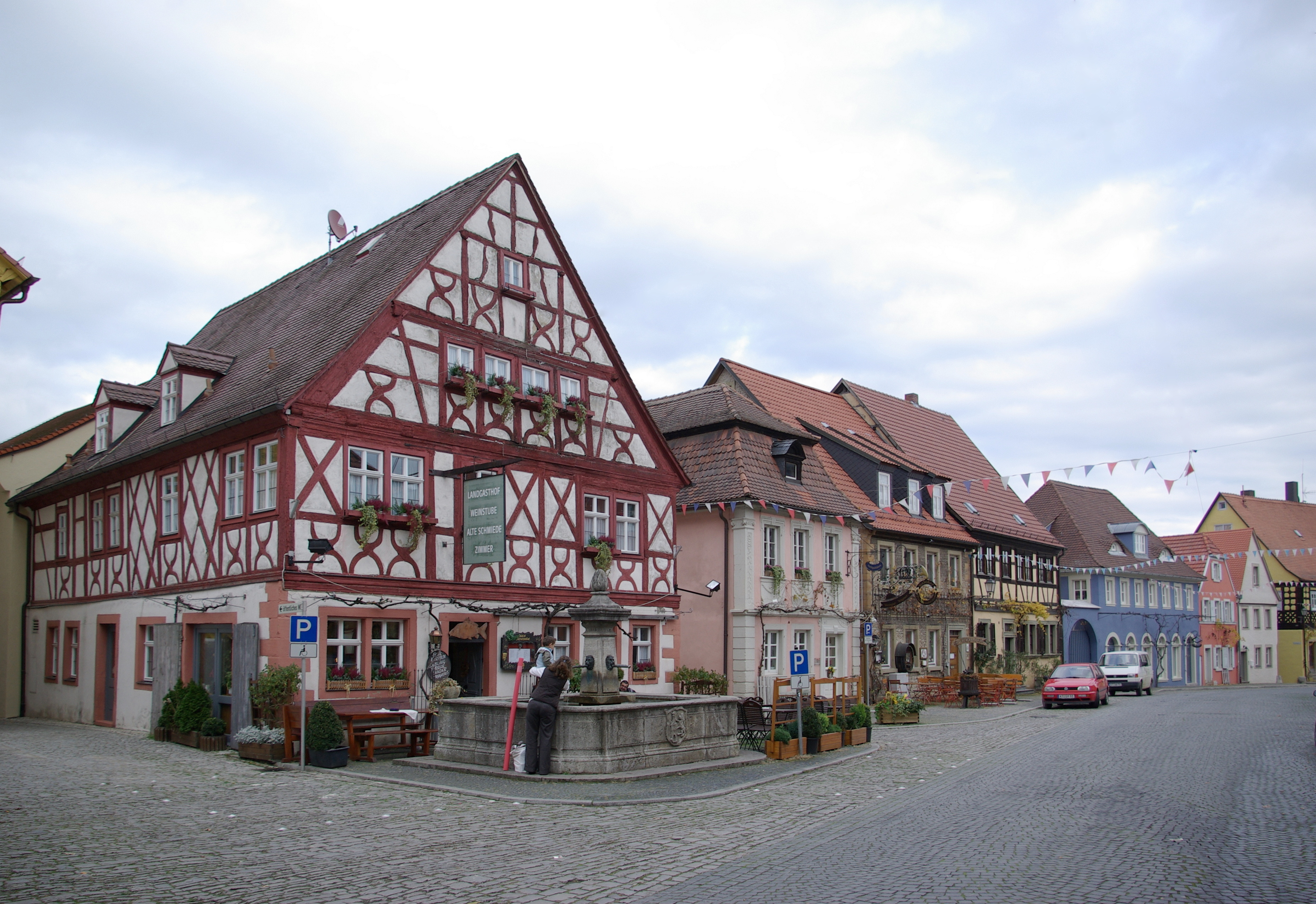 Prichsenstadt, Karlsplatz